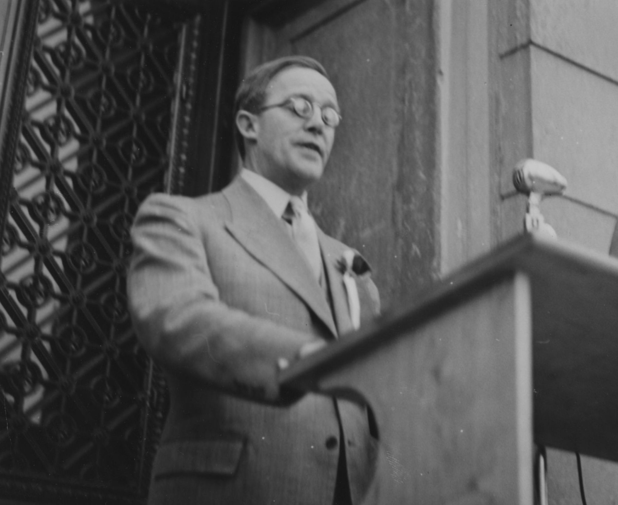 Professor Frede Castberg taler 17. mai 1944 i Uppsala. RA/PA-1209/Uc/65/1-2/S 5040